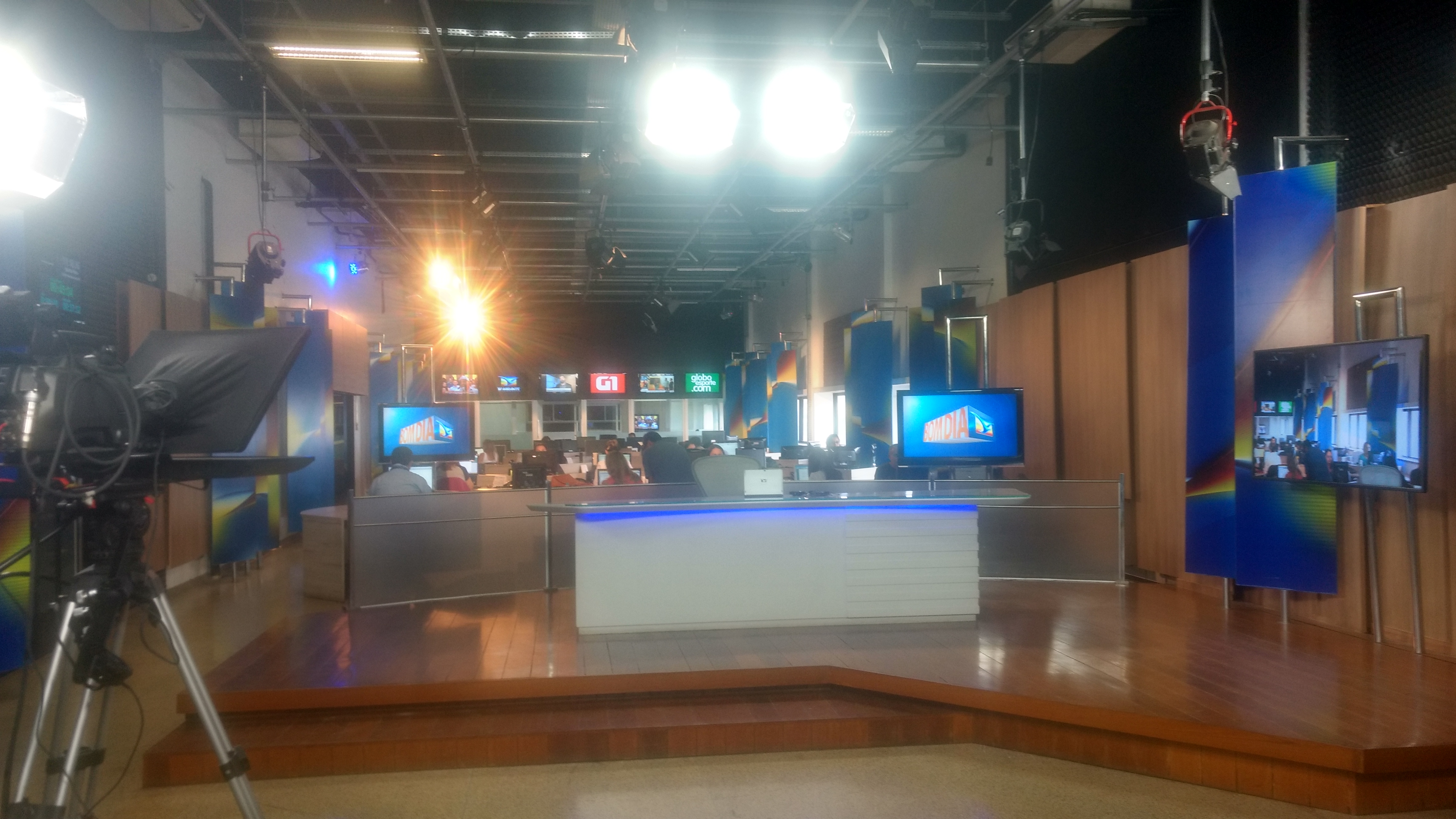 Estúdio de jornalismo da TV Mirante, emissora de televisão brasileira sediada em São Luís, Maranhão